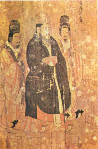 Summary Der Sui-Kaiser Yangdi (* 560/ † 618). Quelle: zh-wikipedia.